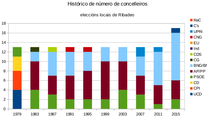 Histórico número de Concelleiros por agrupación. Ribadeo